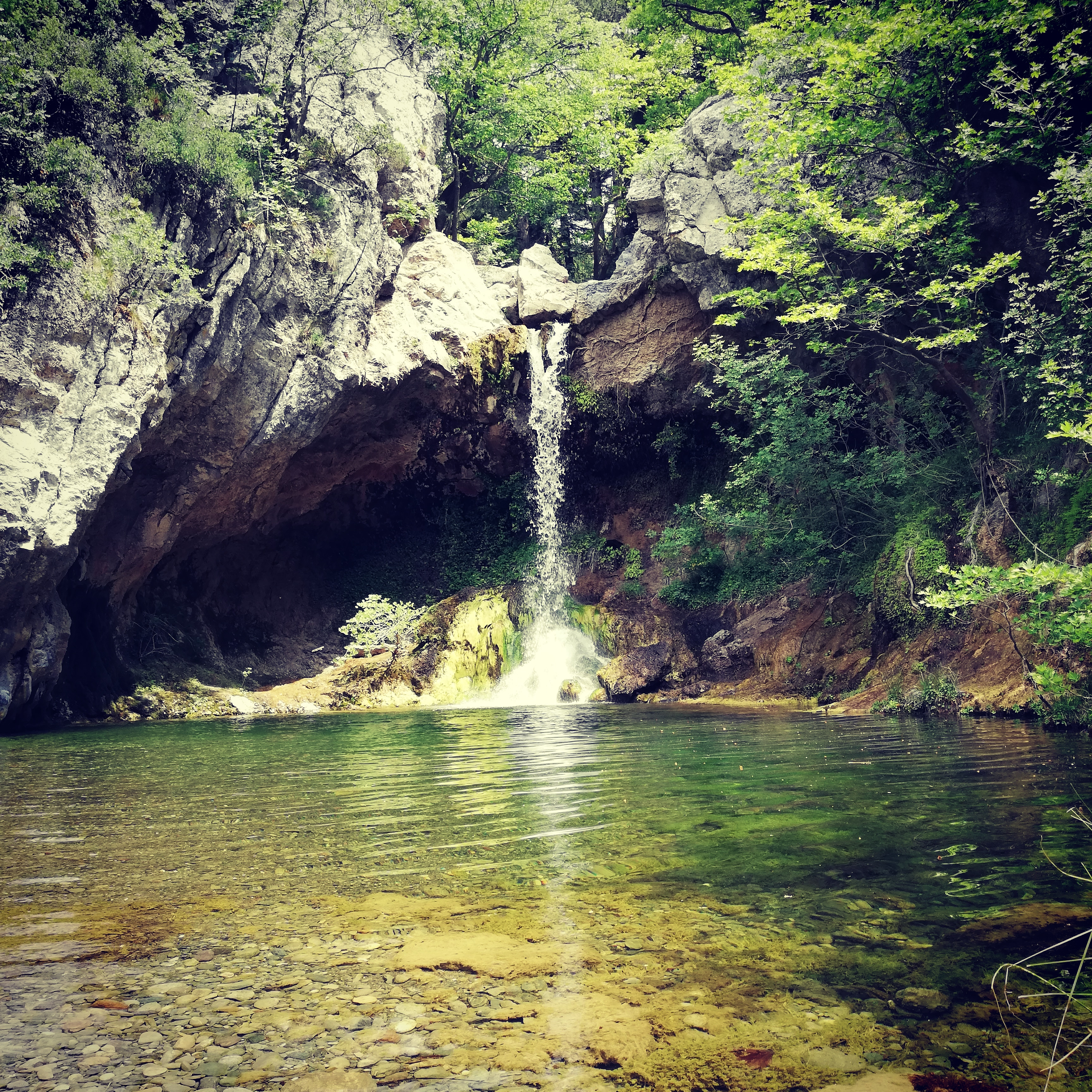 Κύριος καταράκτης